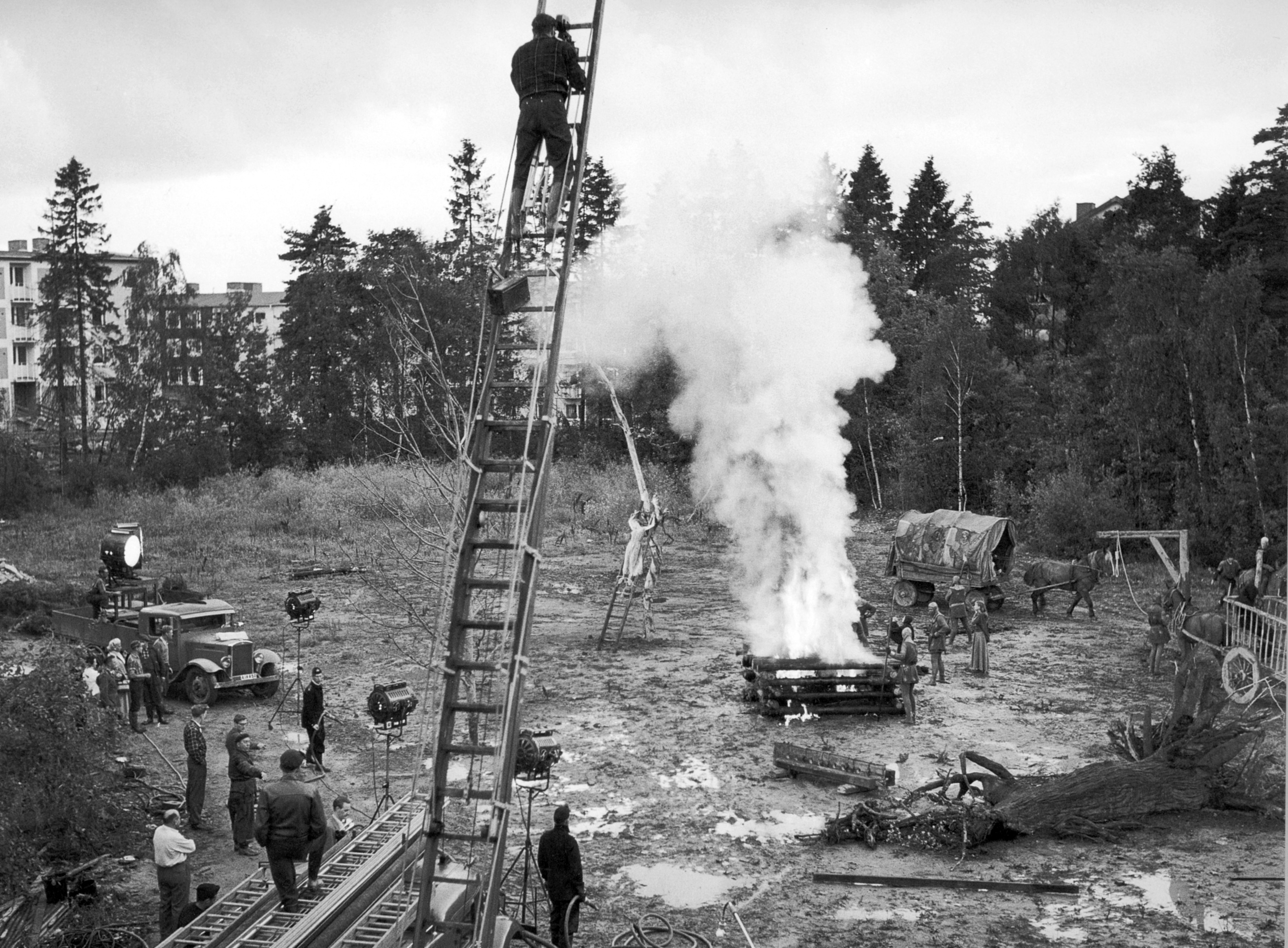 Inspelning av Ingmar Bergmans Det sjunde inseglet på Gamla Filmstaden i Solna. Ingmar Bergman på brandbilen, Gunnar Fischer på brandstegen